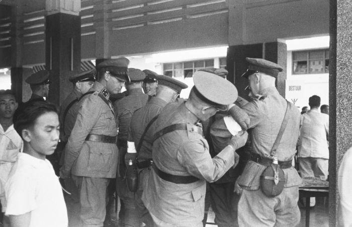 Foto. Reserve-officieren van het KNIL maken zich in Batavia op voor een trainingsmars